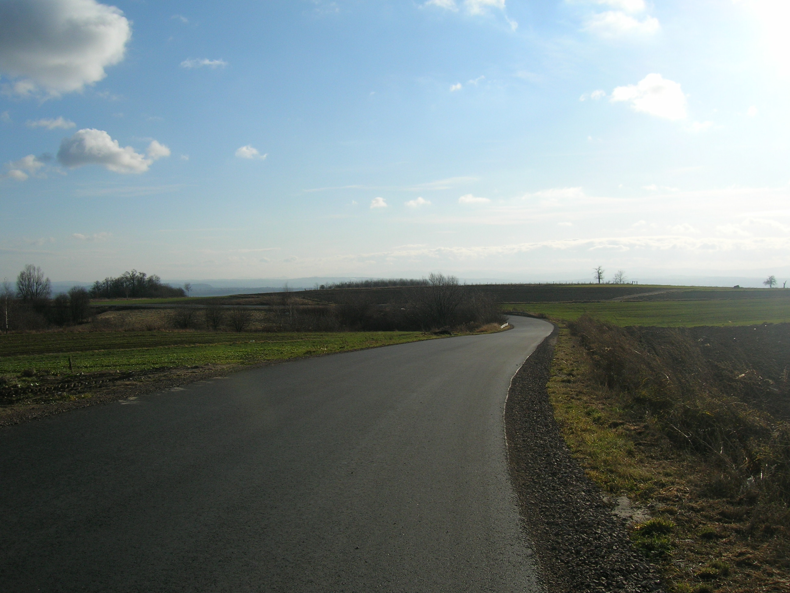 Rybna Kanionka